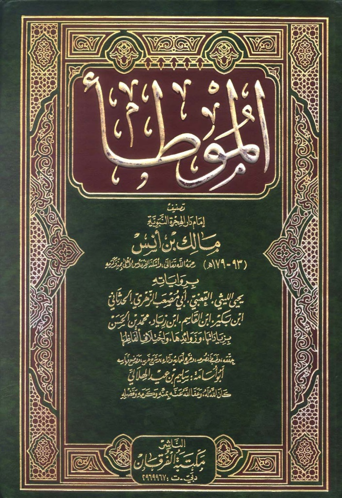 Muwatta El Imam Malik.